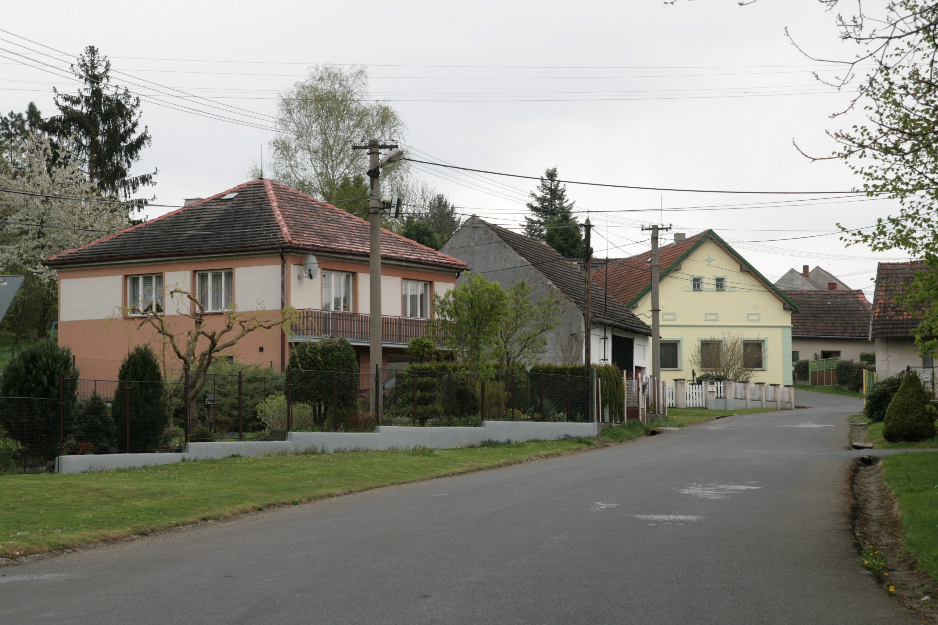 Vesnice Kokšín, část města Švihov. Průhled ulicí od centrální křižovatky východním směrem. Vlevo dům čp. 32 se stodolou, vzadu žlutozelený dům čp. 25.